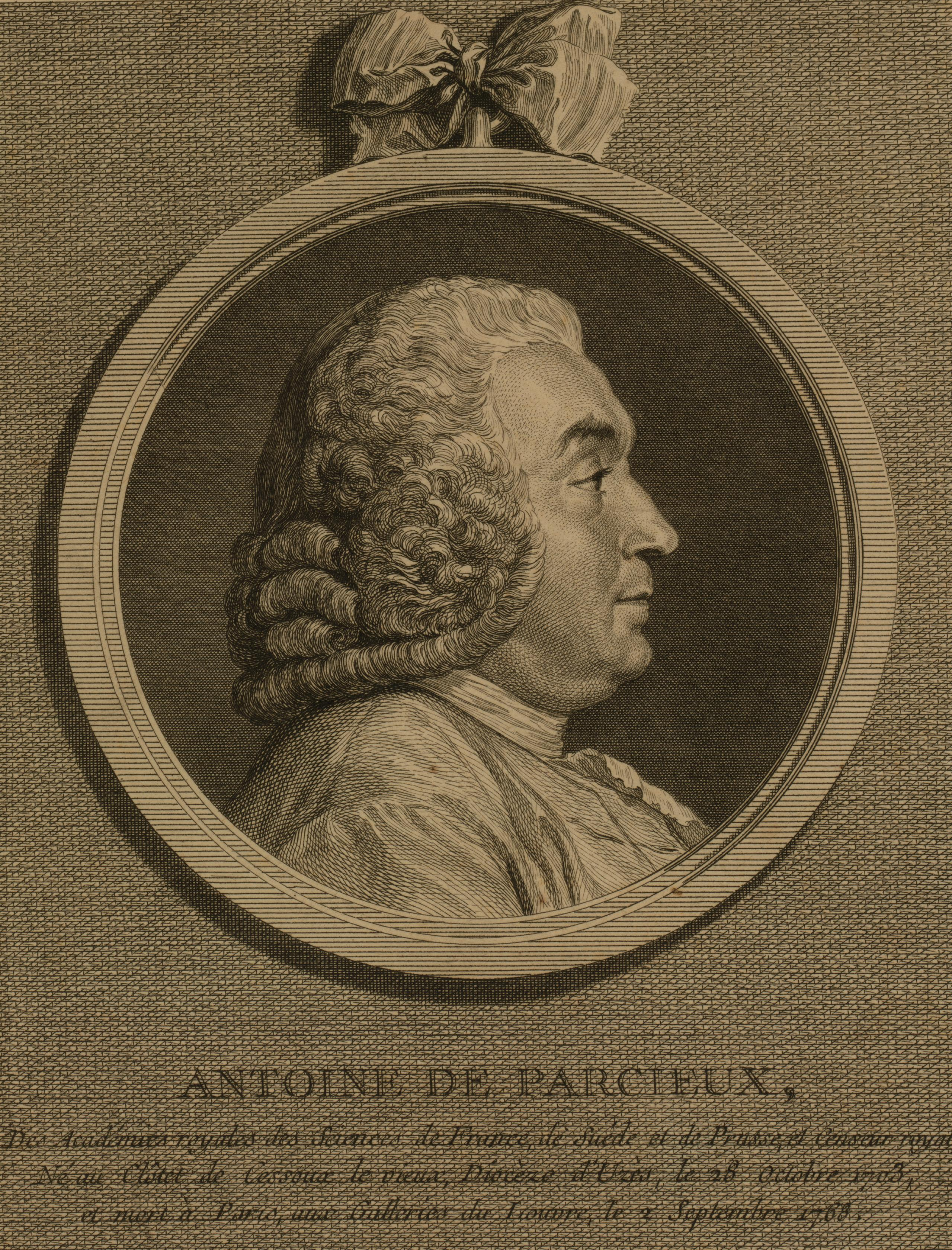 Bust-length profile portrait of French mathematician Antoine de Parcieux. "Antoine de Parcieux, des Academies royales des sciences de France, de Suéde et de Prusse, et Censeur royal. Né au Clôtet de Cessouae le vieua, Dioceze d'Uzès, le 26 octobre 1703, et mort à Paris, aux Galleries du Louvre, le 2 septembre 1768 / C.N. Cochin, del. ; B.A. Nicollet, sculp., 1777."